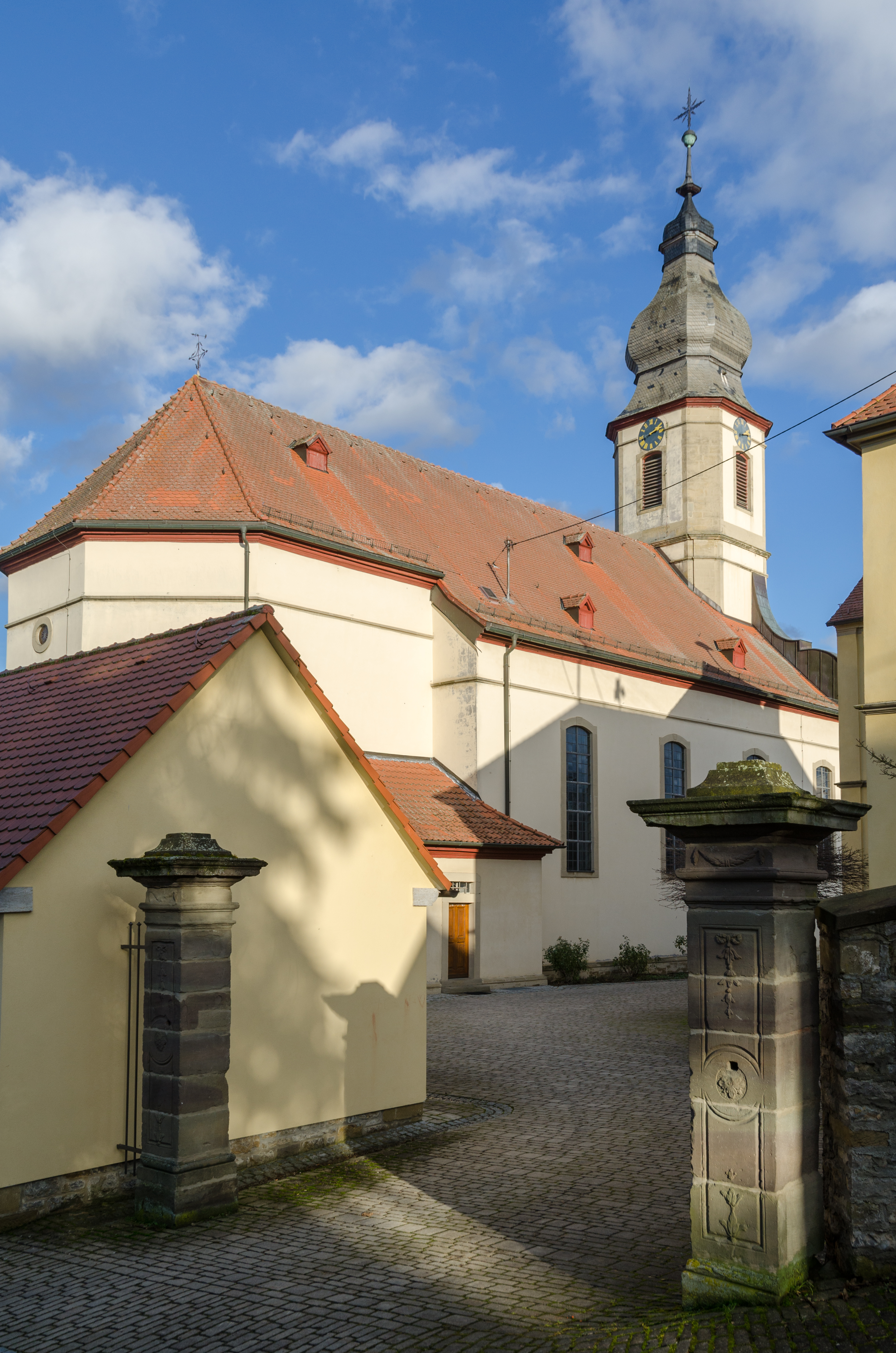 Katholische Pfarrkirche St. Sebastian in Gauaschach